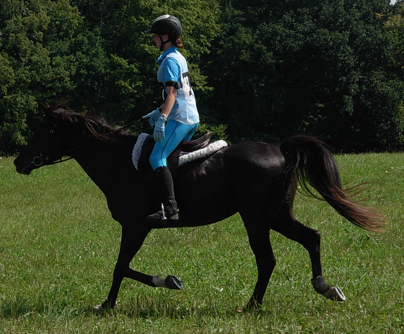 Použití Polar Equine při endurance